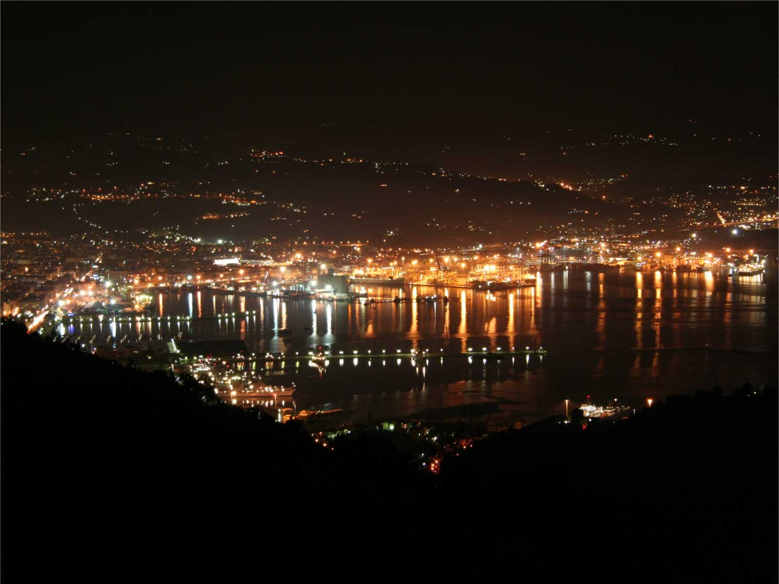 La Spezia notte